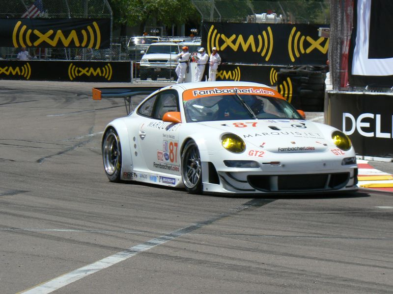 Dirk Werner driving the Farnbacher-Loles Motorsport's Porsche 997 GT3-RSR